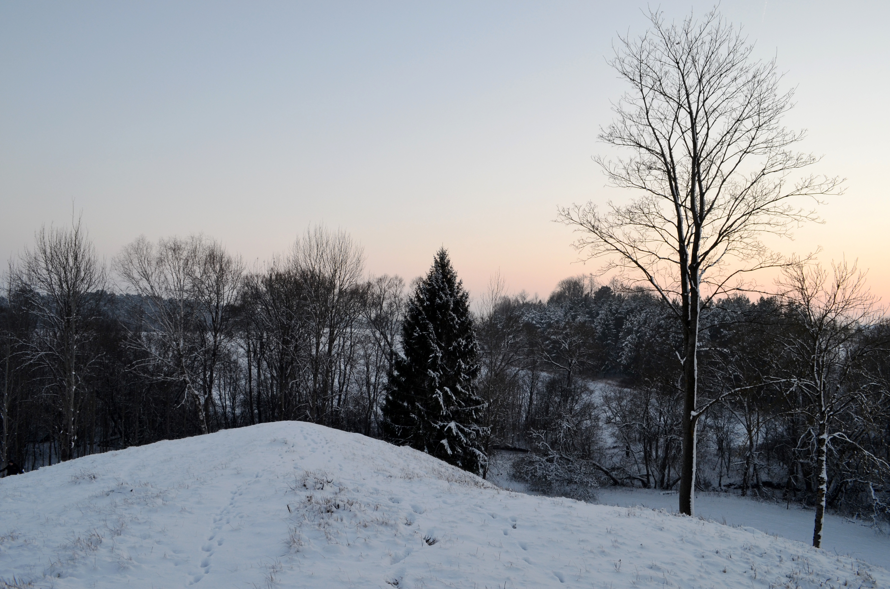 Kalnaberžės piliakalnis, Kėdainių raj.